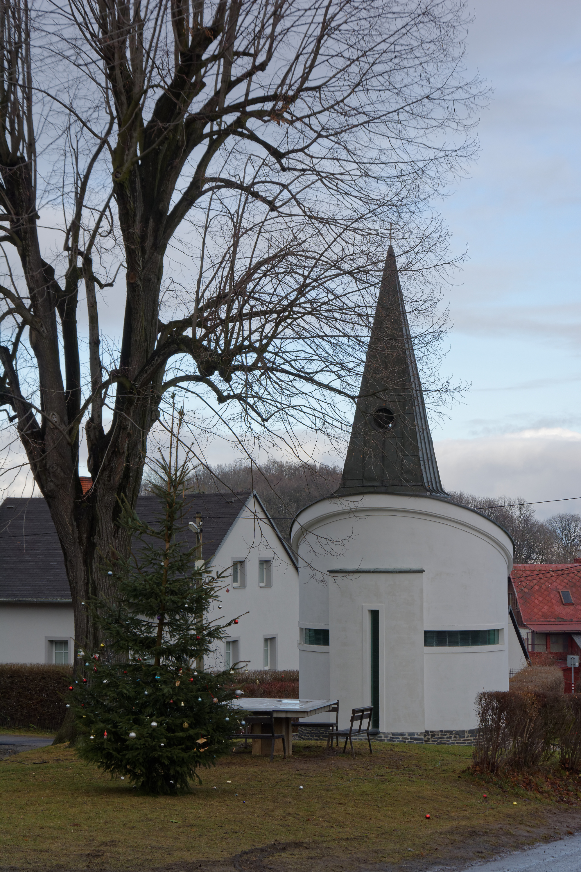 Kaple svatého Václava v Bílce, pohled od jihu